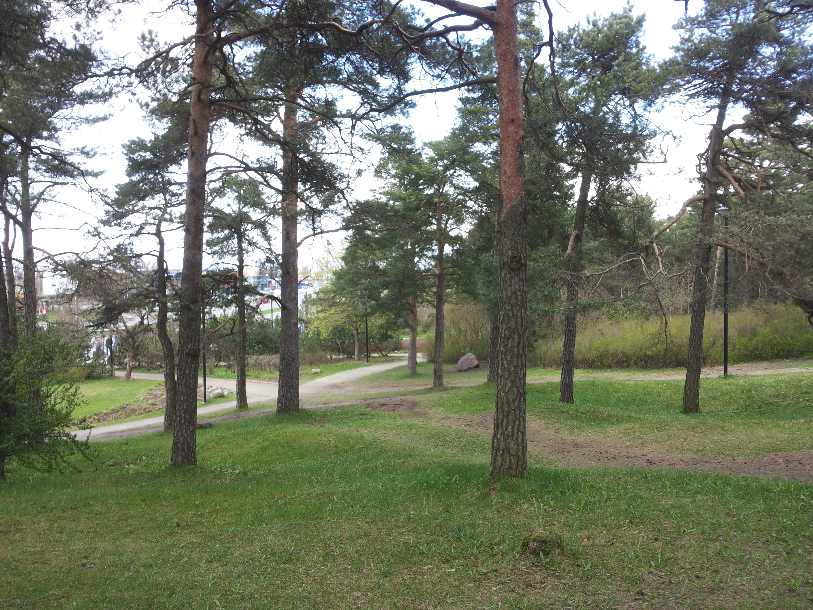 Oravamäe park